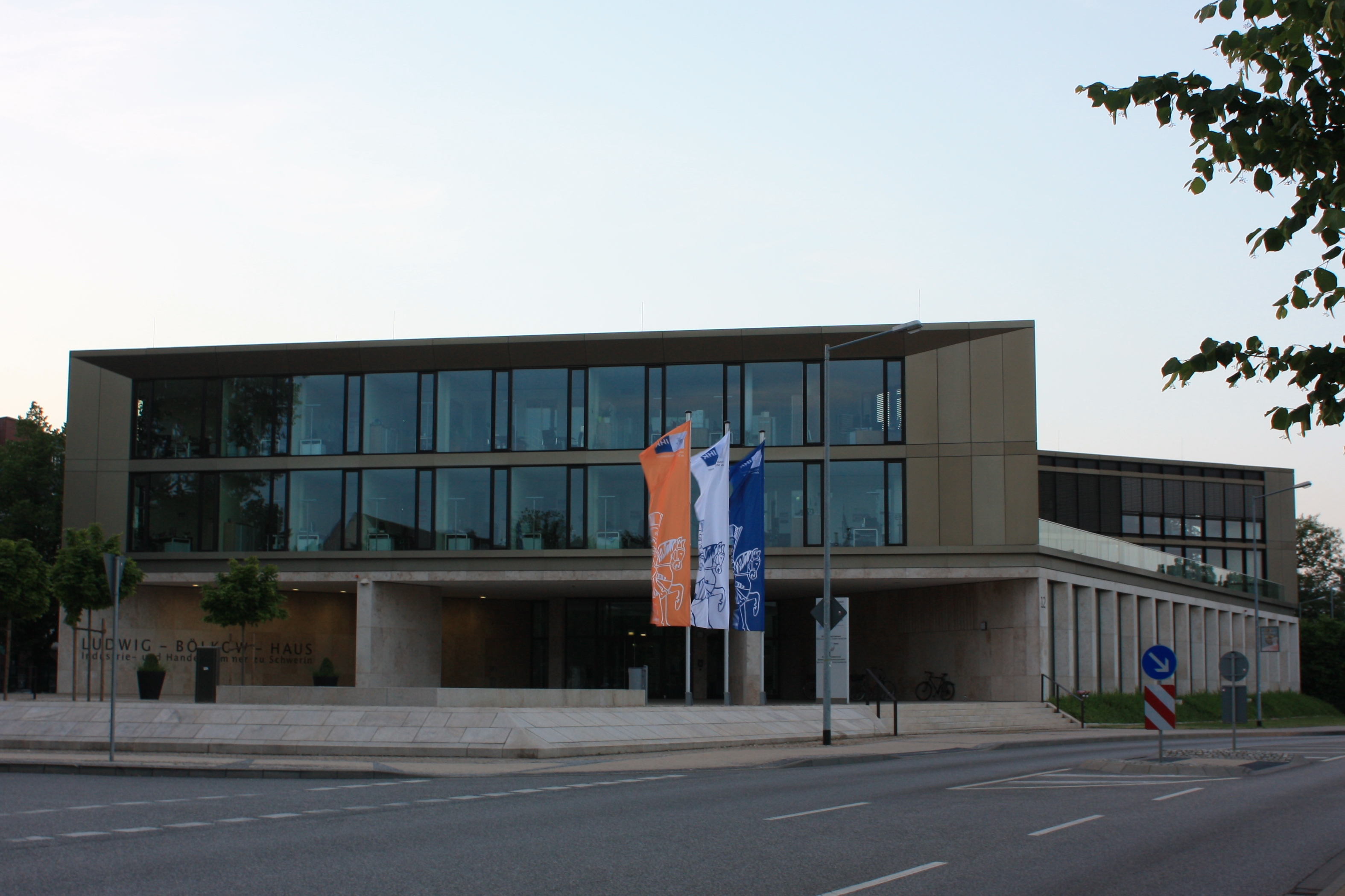 Das Ludwig-Bölkow-Haus in Schwerin, Sitz der Industrie- und Handelskammer